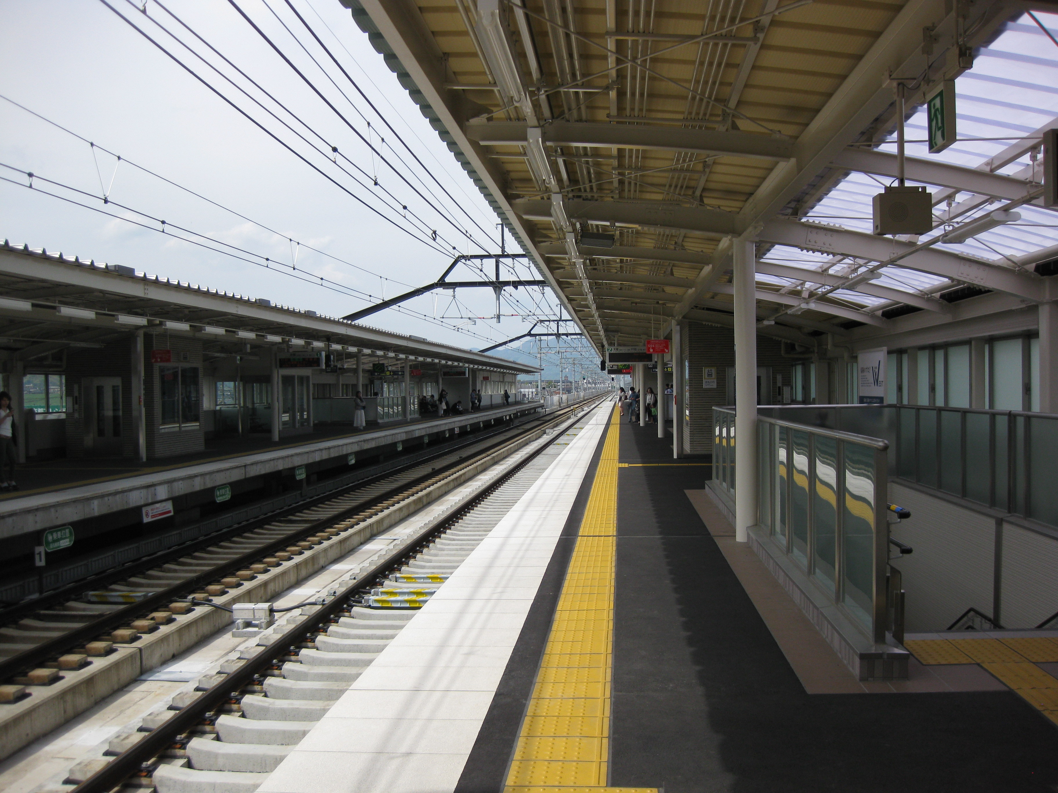 洛西口駅プラットホーム